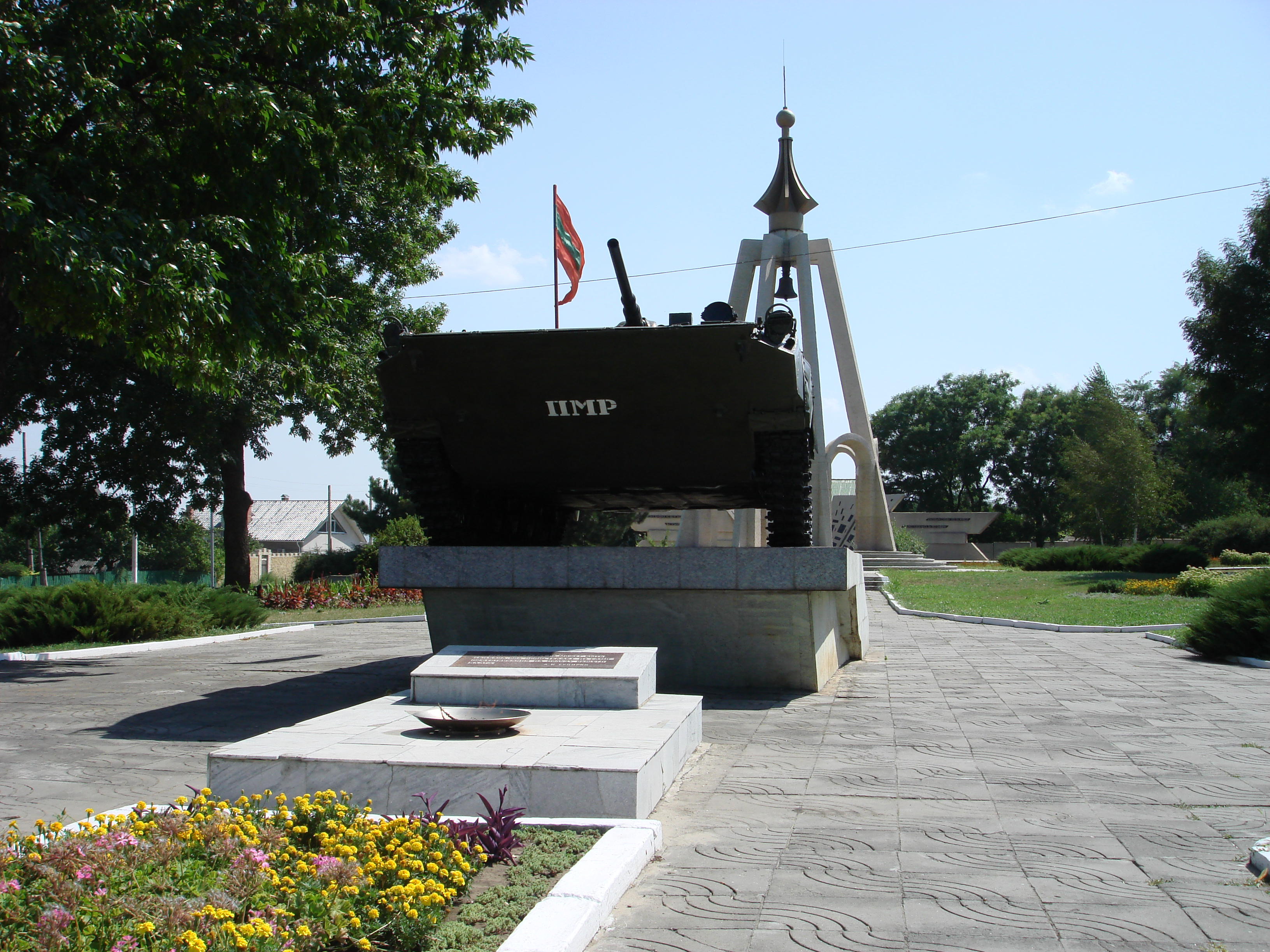 Мемориал Славы (Бендеры)